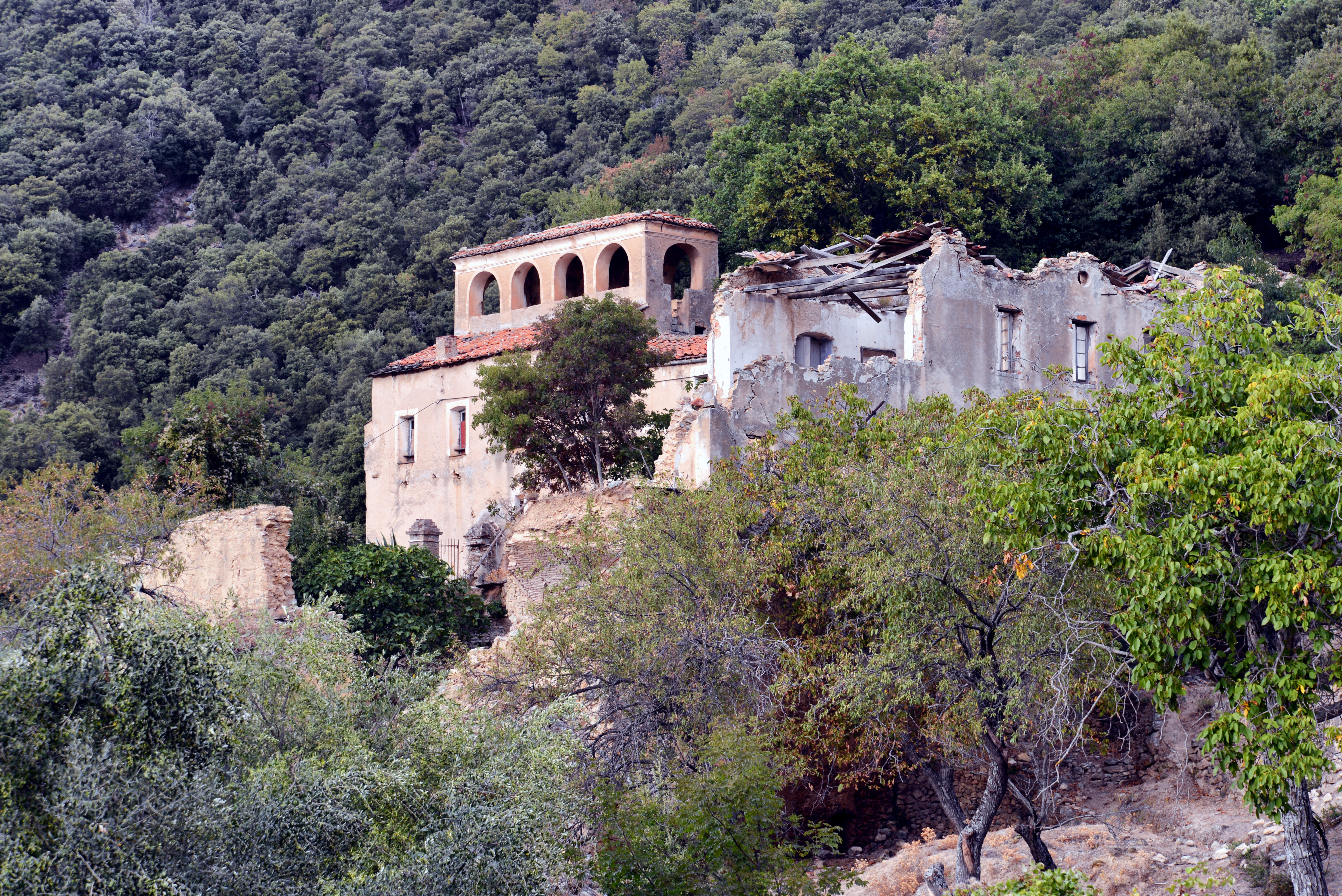 Omessa, Talcini (Corse) - Ancien couvent des Récollets (1624) ruiné, sur les hauteurs du village